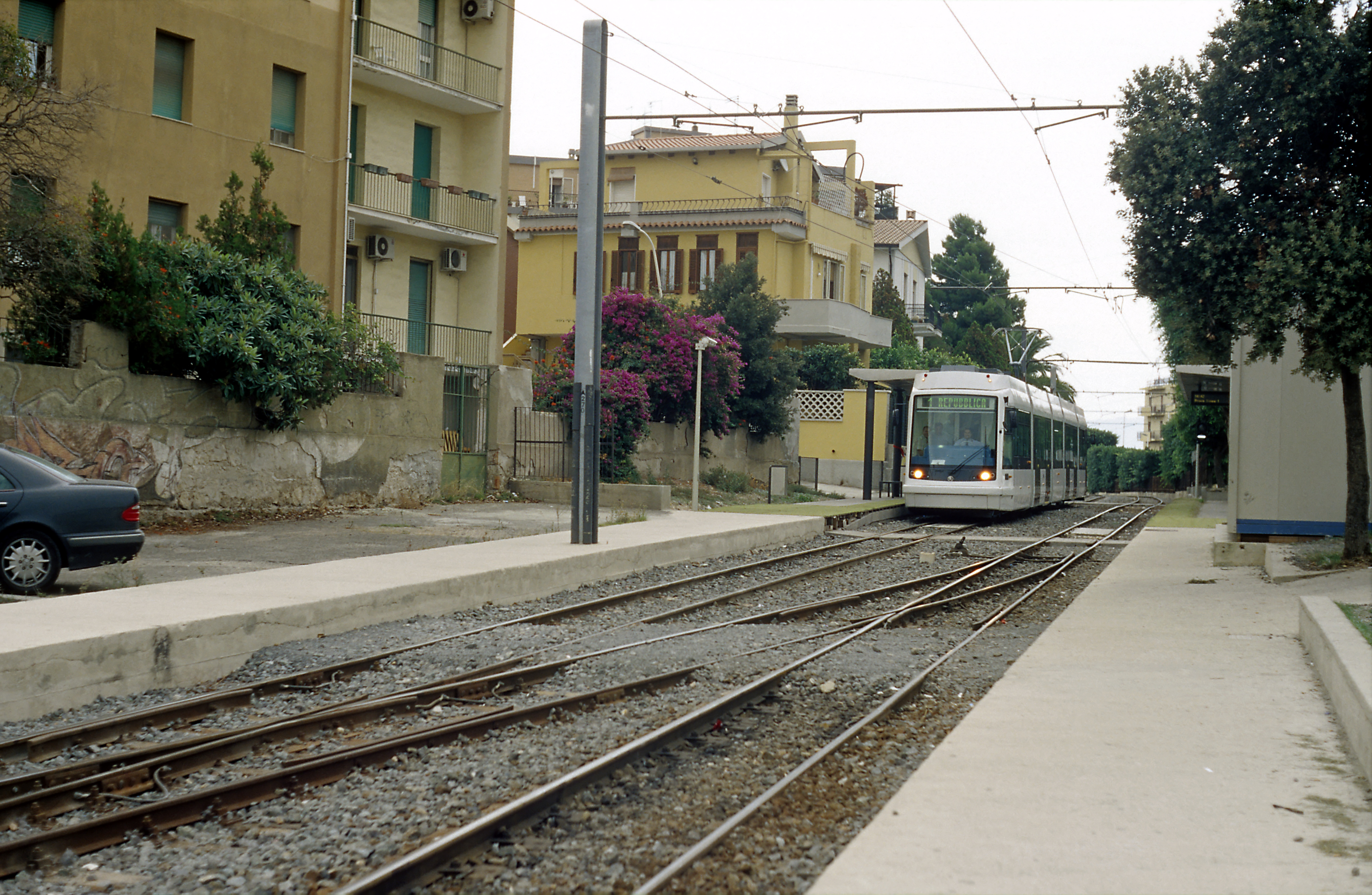 Probefahrten vor der Aufnahme des Stadtbahnbetriebes auf der Stadtstrecke Piazza Repubblica–San Gottardo Richtung Piazza Repubblica. Der Oberbau stammt hier noch von der Fernbahnbetriebszeit.